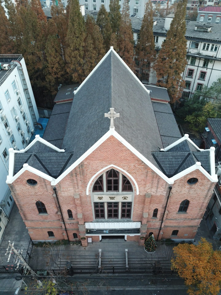 中文（中国大陆）: 景灵堂（原称景林堂）俯拍